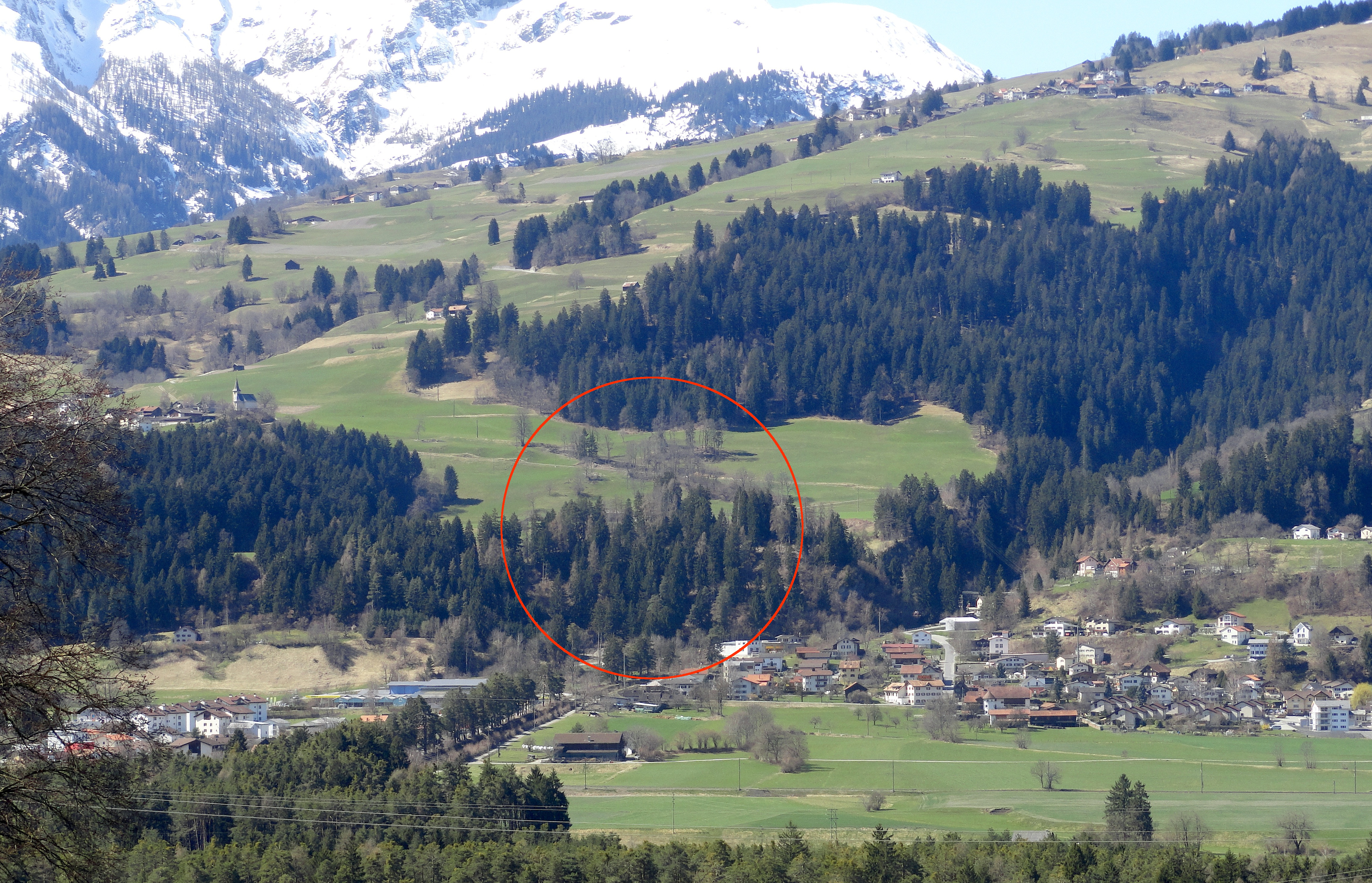 Hügelkuppe mit der Cresta-Siedlung bei Cazis